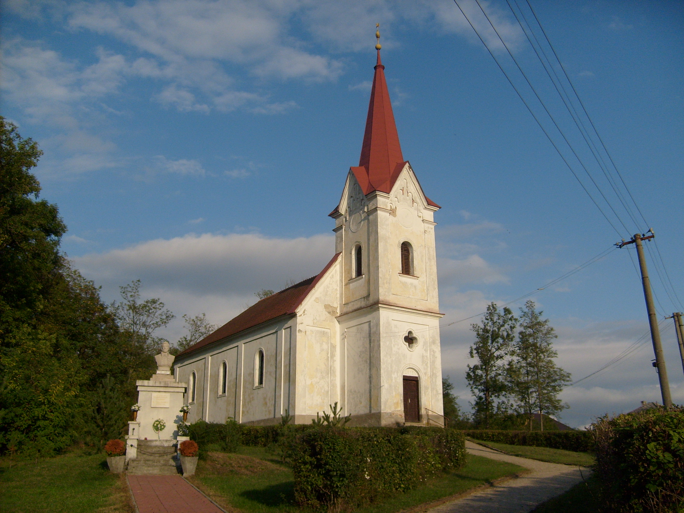 Az 1879-ben épült református templom, bal oldalán az 1849-49-es szabadságharc emlékművével.